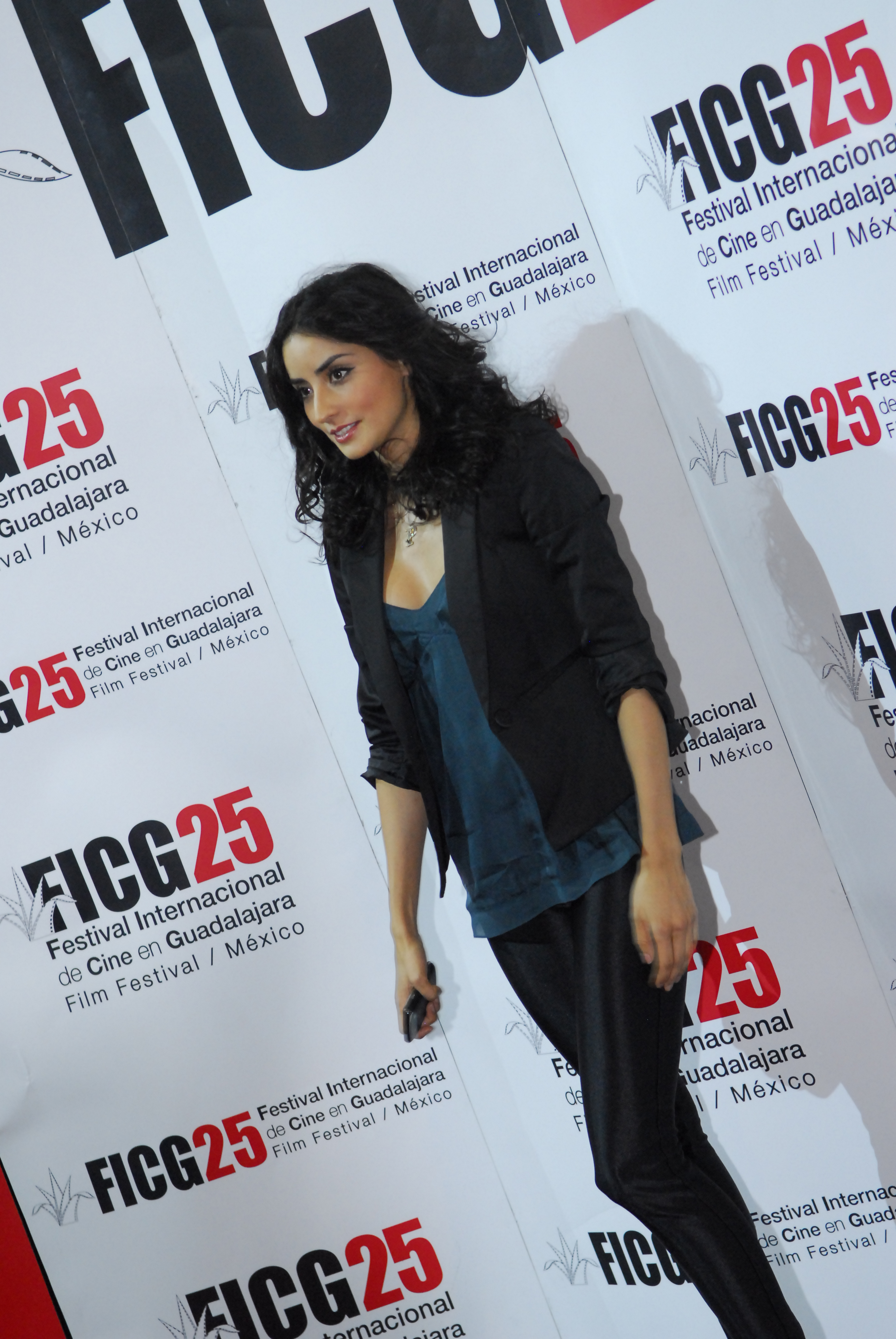 Paola Núñez - Entrega del premio Internacional a la Directora Agnés Varda-18_03_10-©cortesía de FICG 25_Oscar Delgado